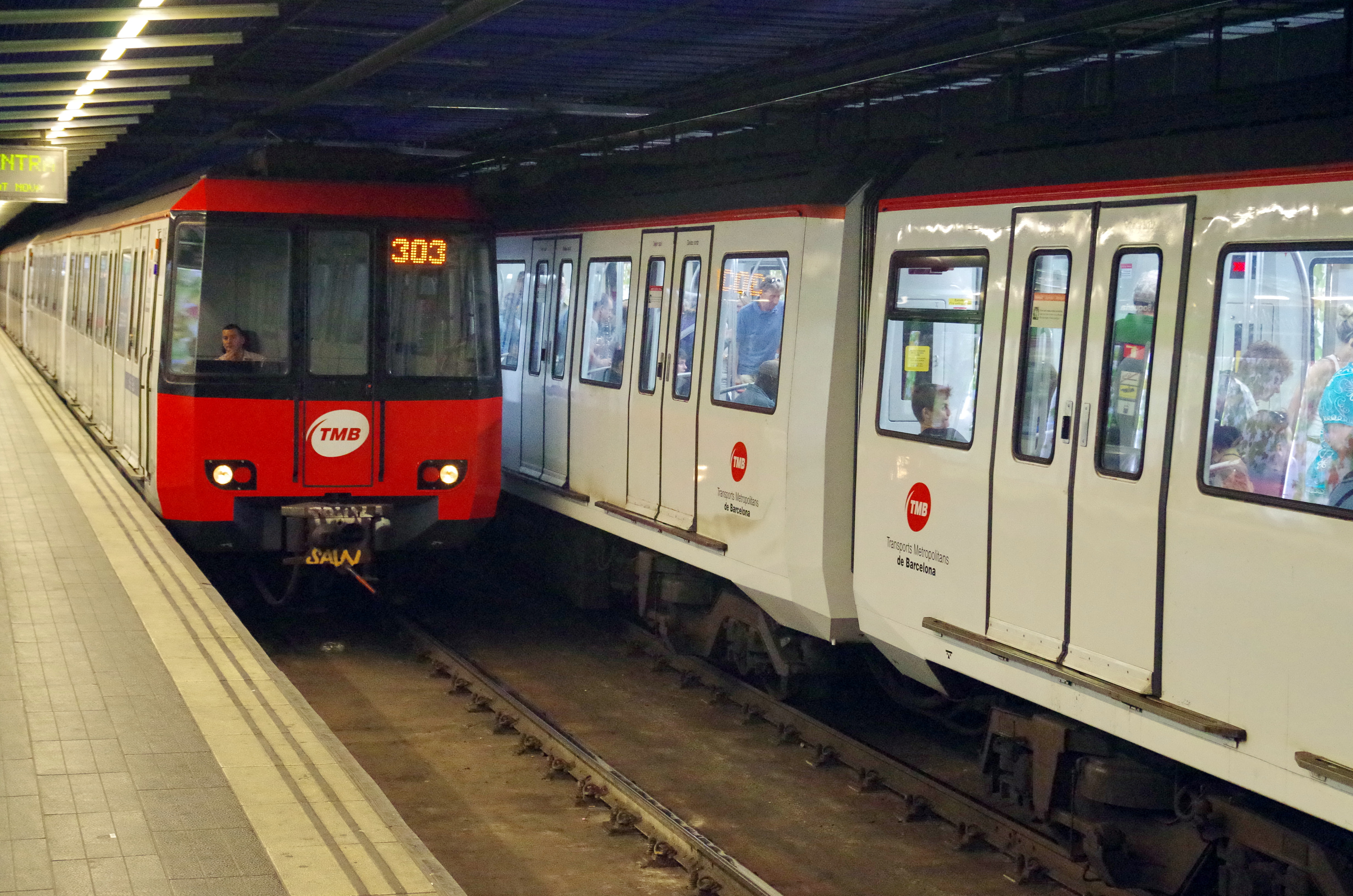 Barcelona Metro